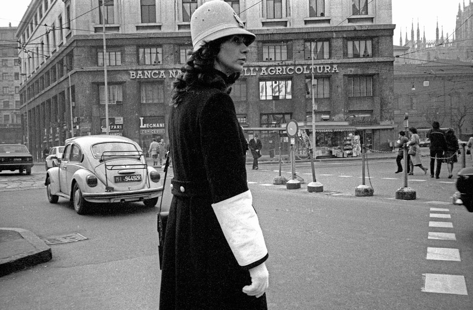 Milano, vigilessa in via Larga